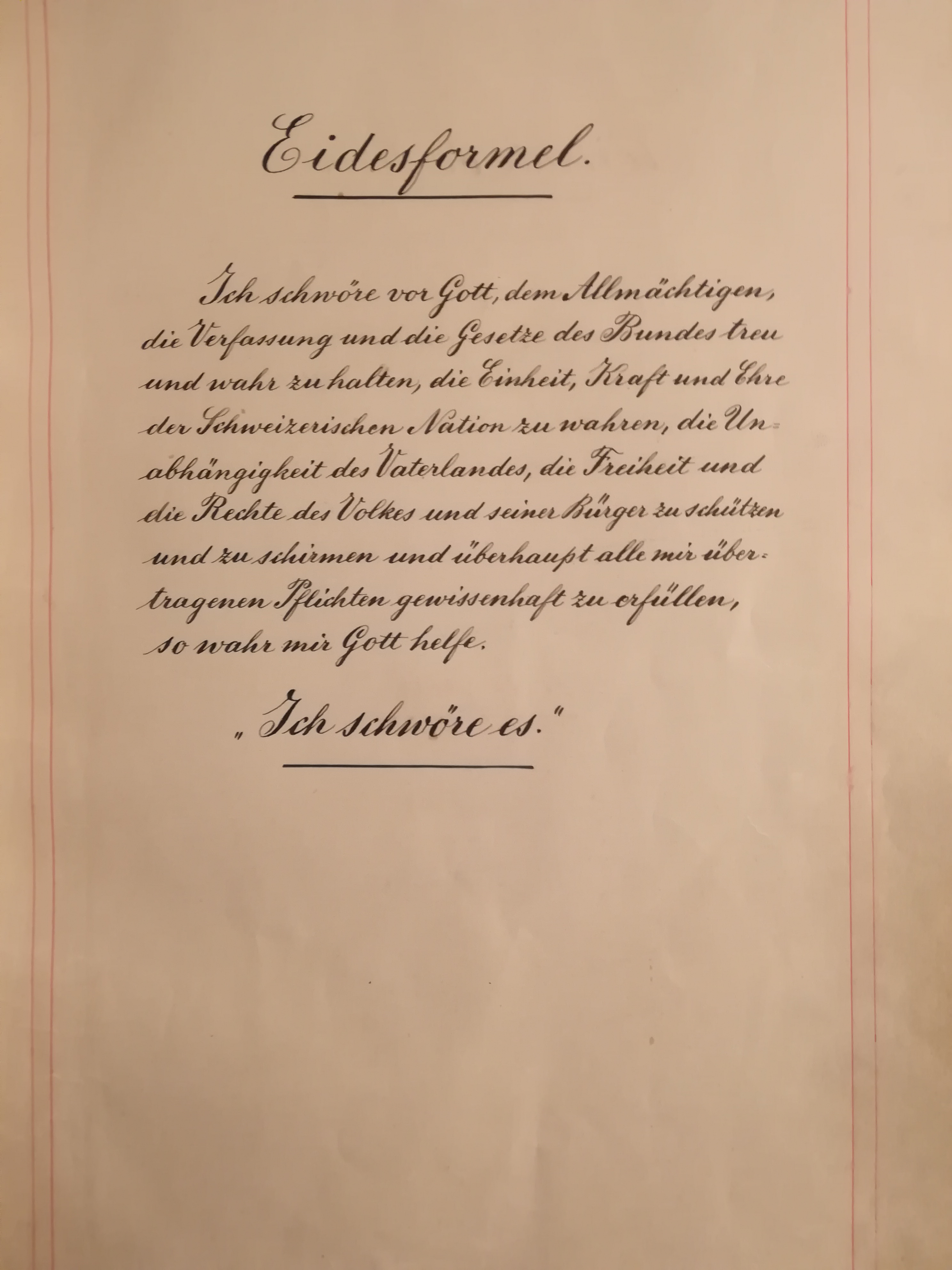 Eidesformel, die im Rahmen der Vereidigung im Schweizer Parlament zur Anwendung gelangte.